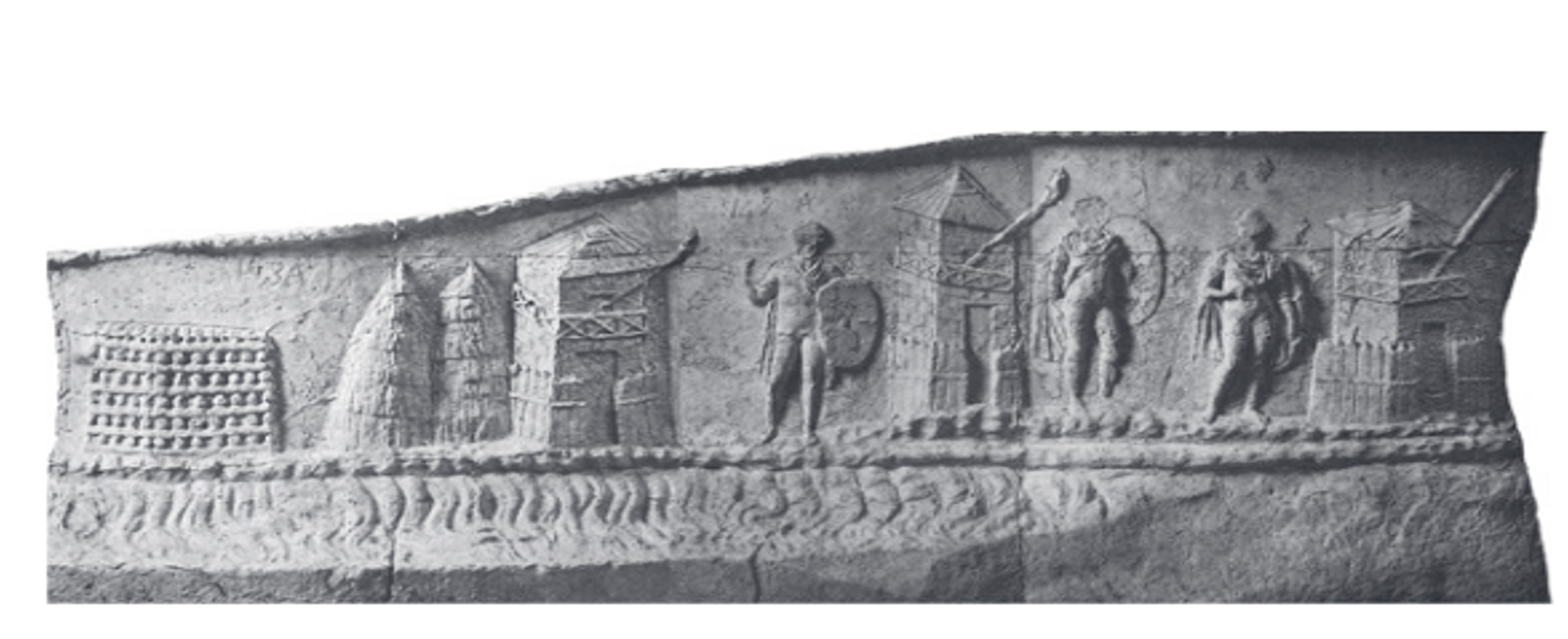 Relief an der Traiansäule in Rom (113 n. Chr.), es zeigt römische Wachtürme an der unteren Donau, daneben Heu­ oder Strohschober für die Versorgung der Lasstiere und einen Holzstoss für die Feuersignale. An jedem Turm ist eine Fackel angebracht, die zur Nachrichtenübermittlung durch Lichtzeichen diente.